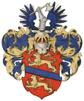 Knabenau suguvõsa vabahärravapp